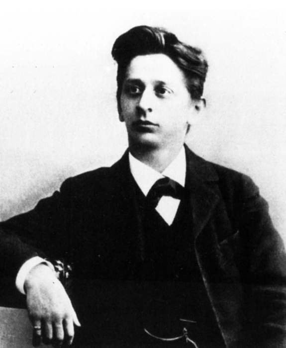 Porträt des österreichischen Komponisten Alexander von Zemlinsky